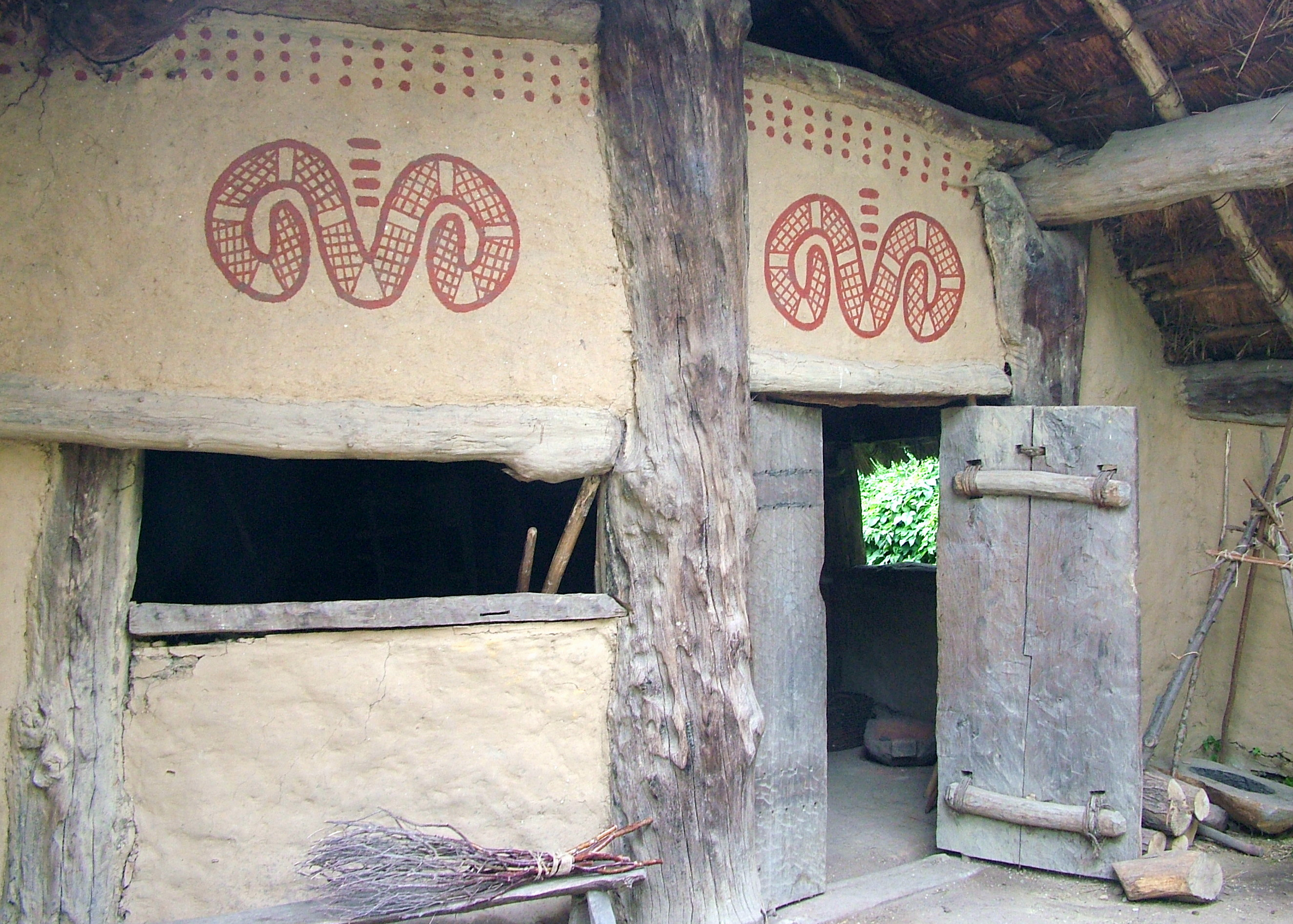 Archeon, Jungsteinzeithaus.